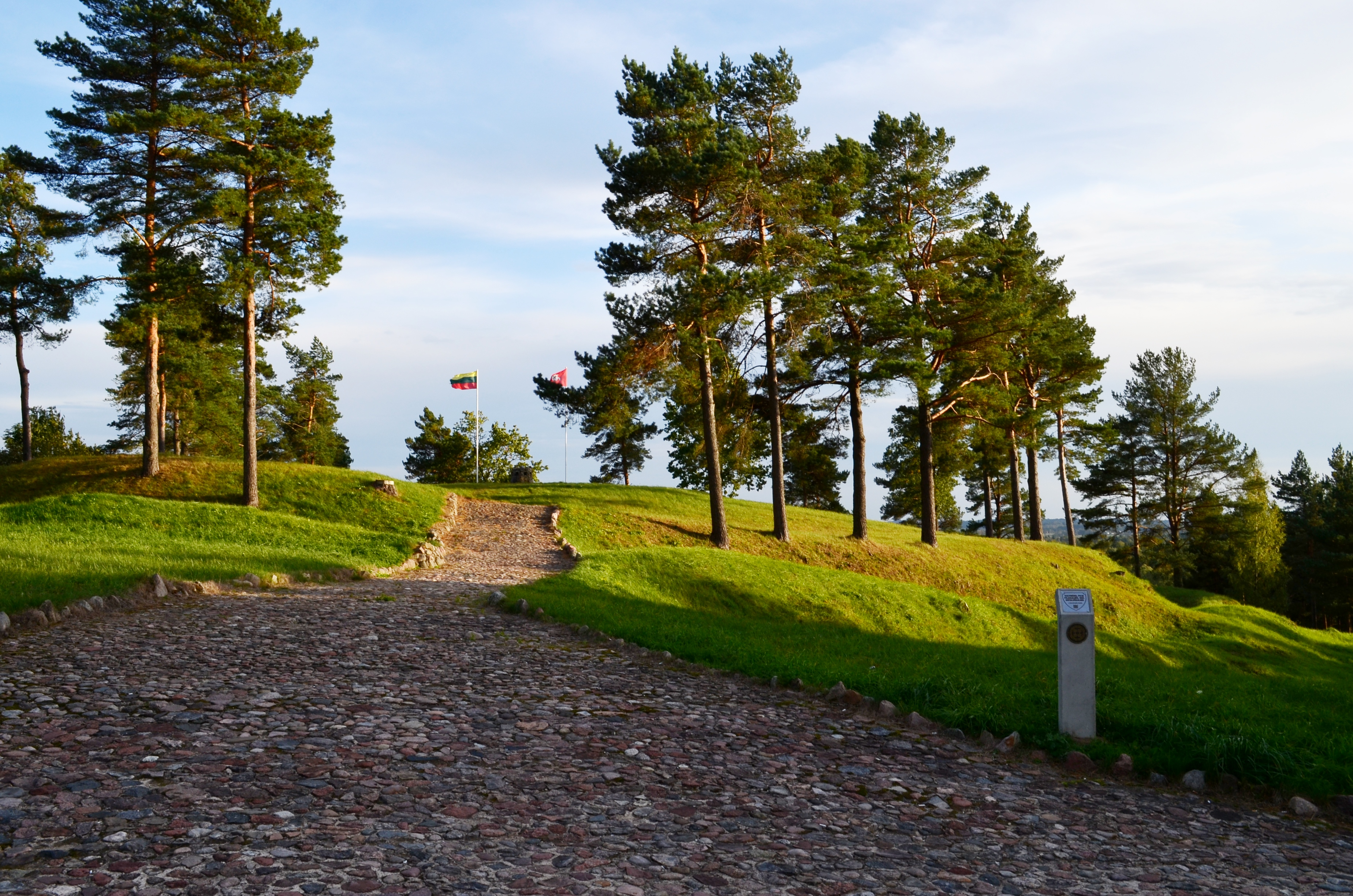 Kepaluškalnis (Kaltinėnų plk.), Šilalės raj.